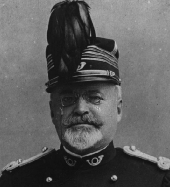 photographie d'Ernest Perrin en uniforme des Eaux et Forêts